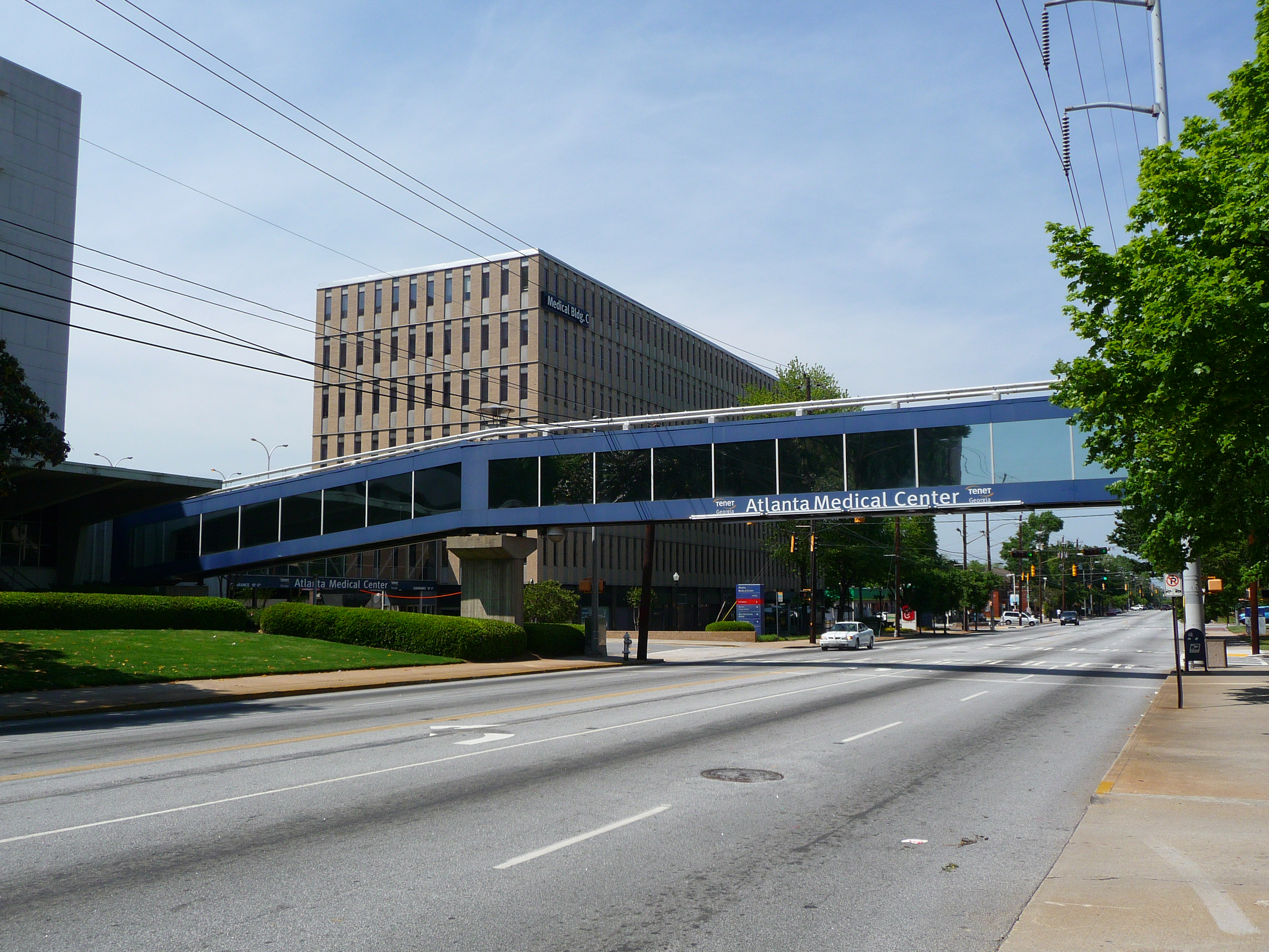 Atlanta Medical Center